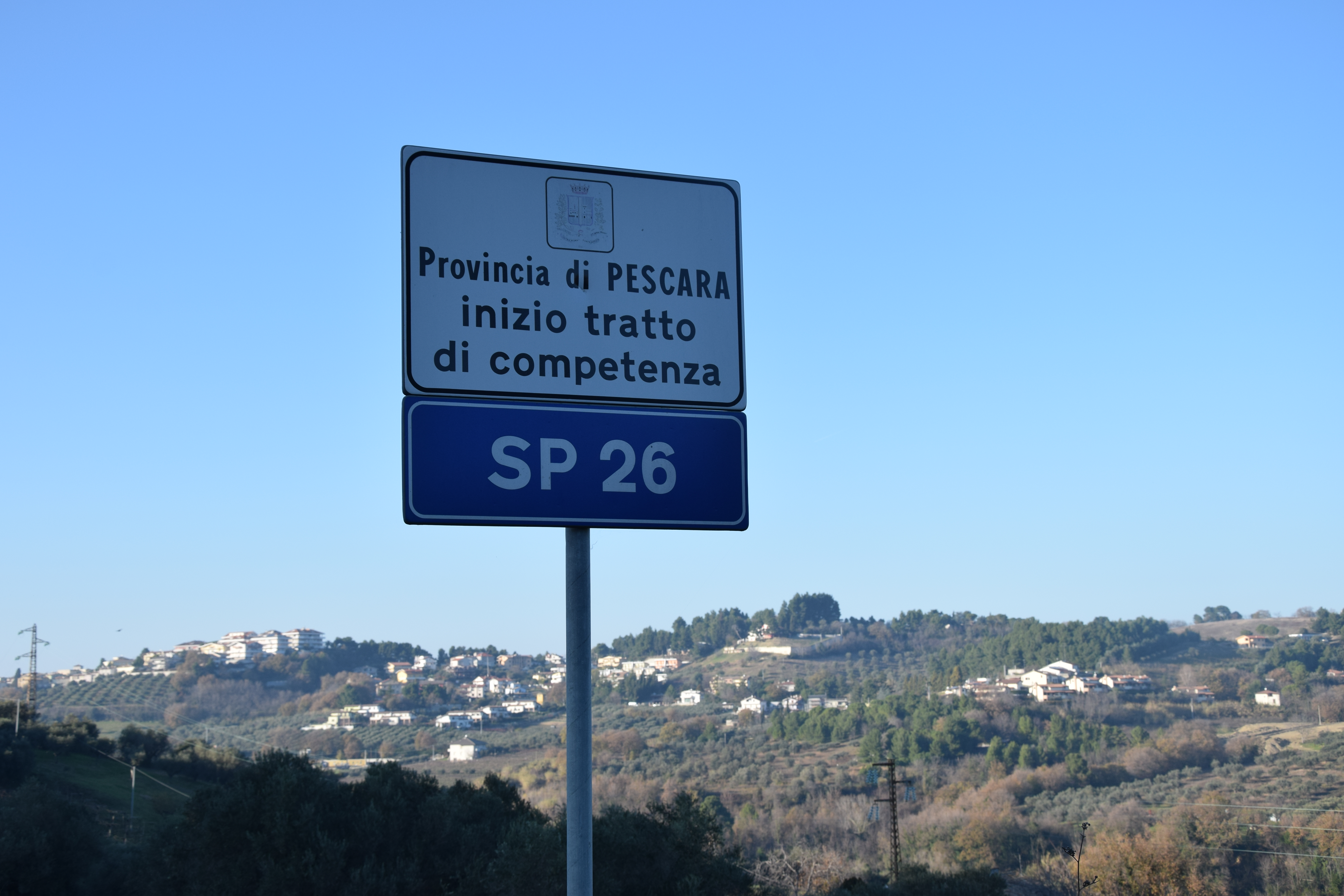 Cartello SP26 Pescara